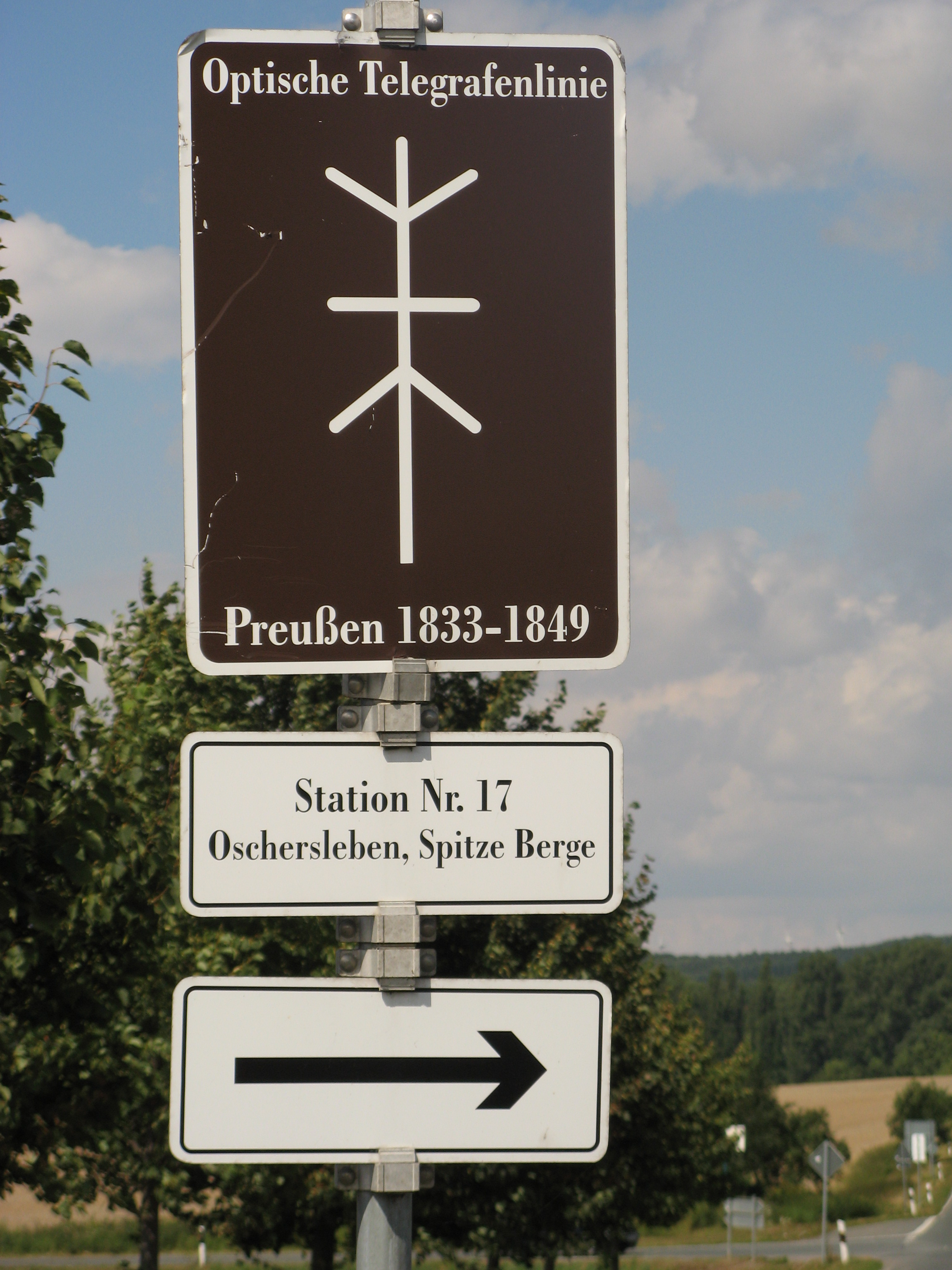 Hinweistafel Optische Telegraphenlinie Station 17 bei Oschersleben